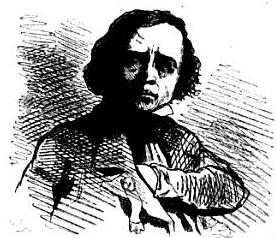 Caricature de Vivien, par Cham.